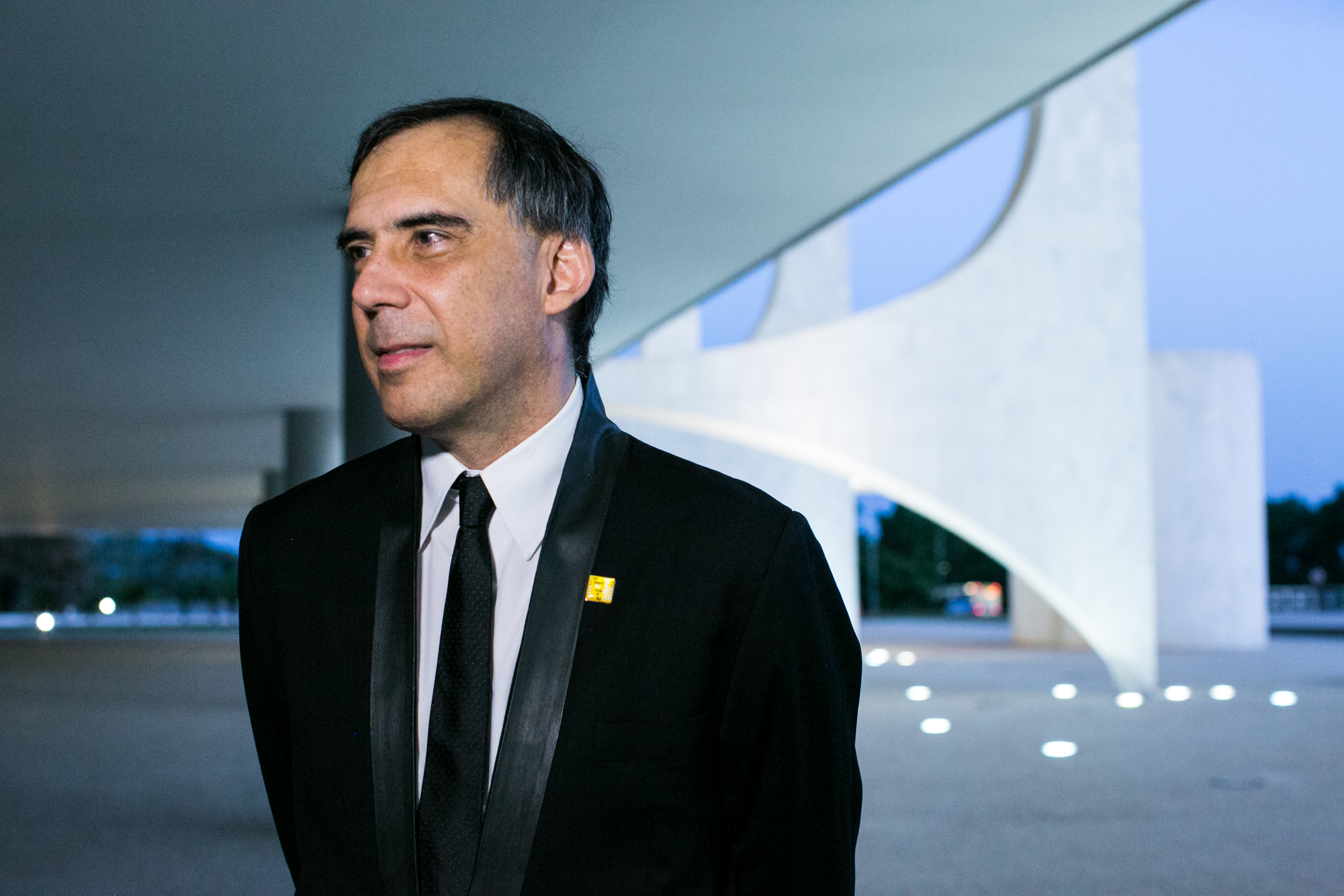 Foto:LiadePaula/MinC 09/11/2015 Brasí-lia-DF na foto: Arnaldo Antunes link da matéria: goo.gl/AEaCCQ